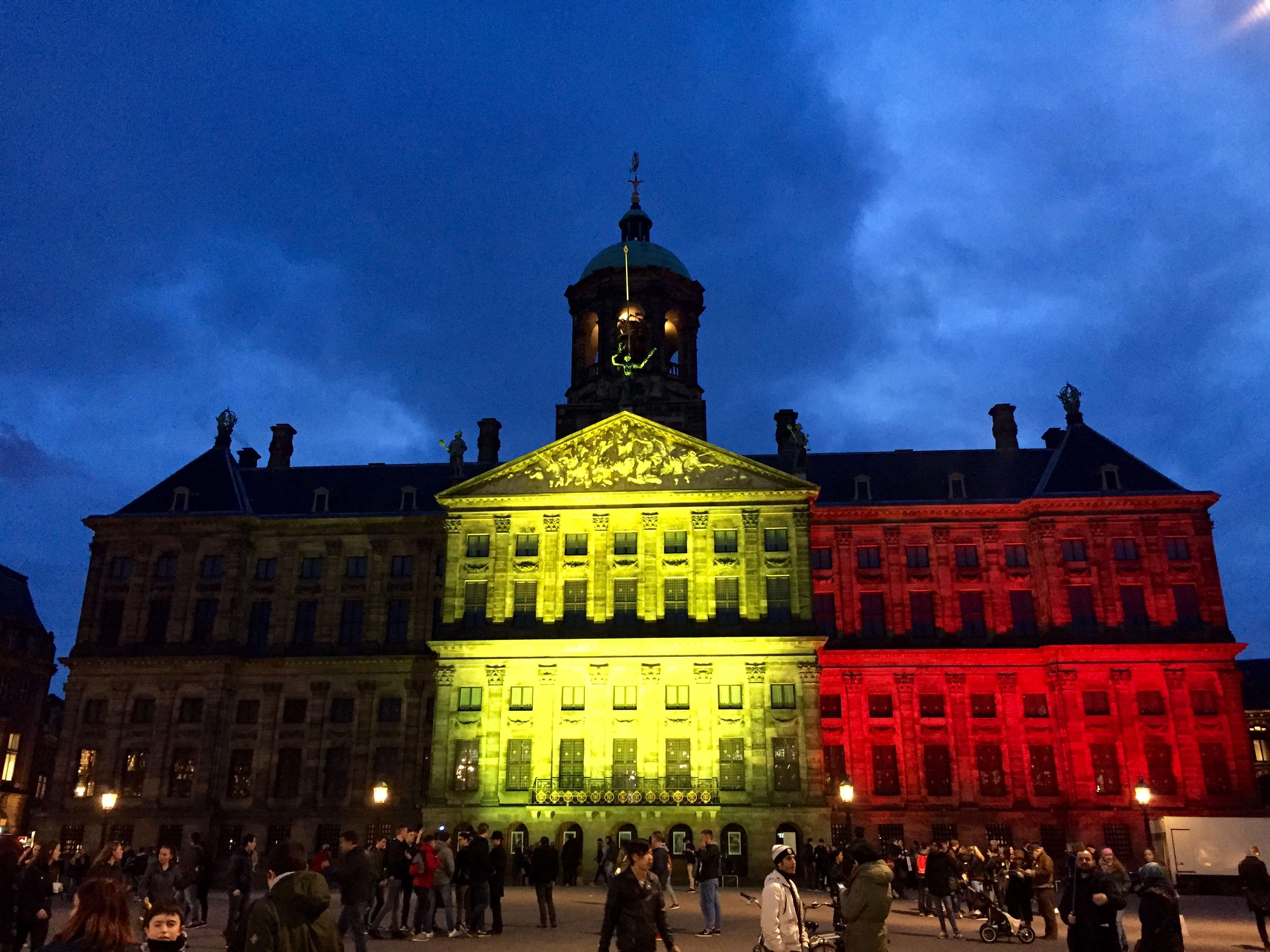 Amsterdam Palace verlicht in de kleur van de Belgische vlag.